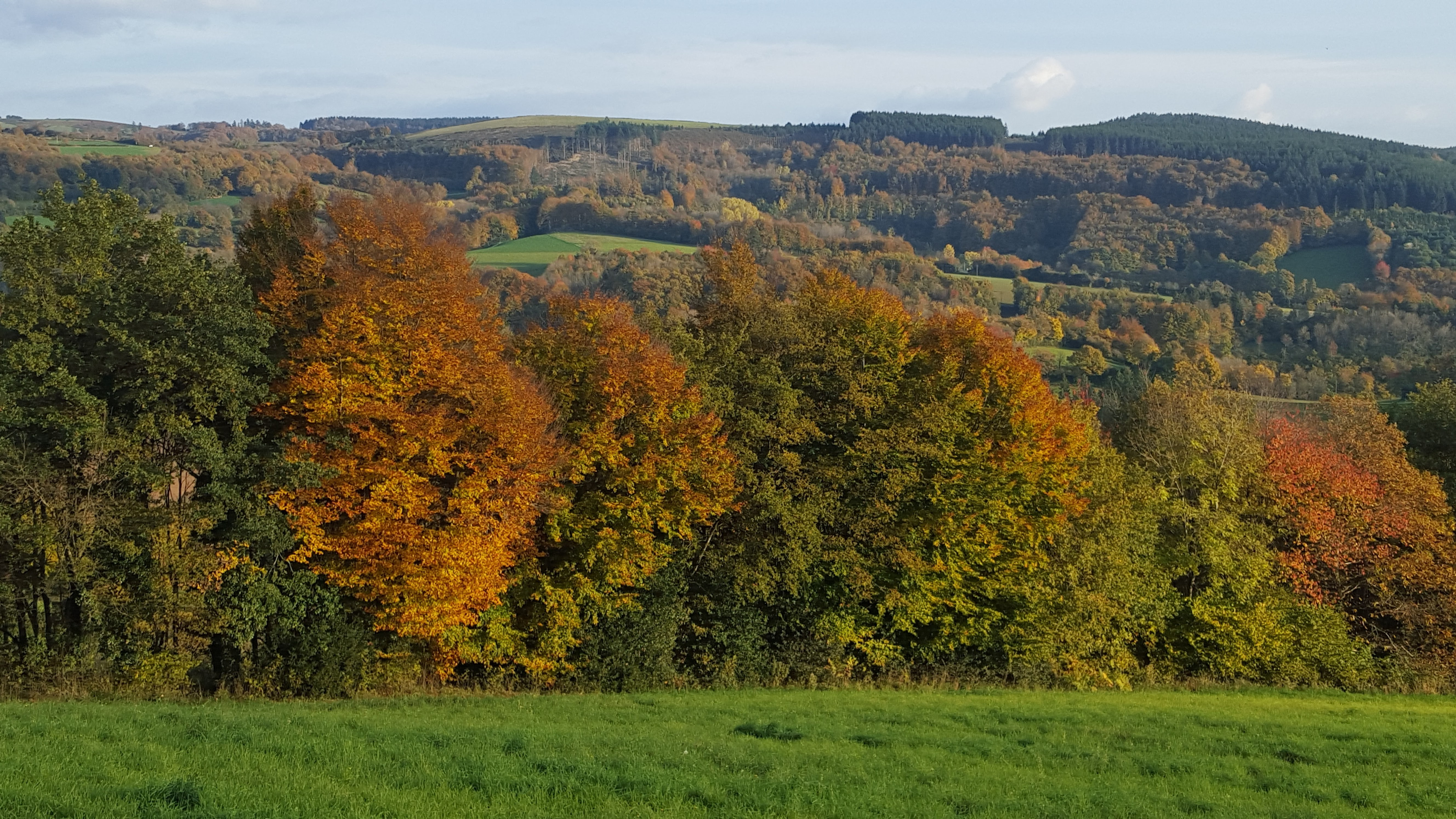 Panorama automnal pris depuis Miremont